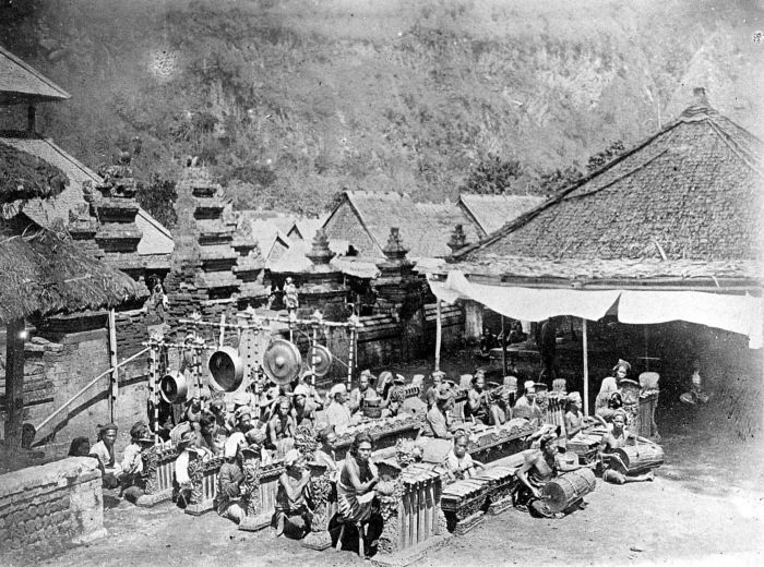 Lichtbeeld. Gamelanorkest